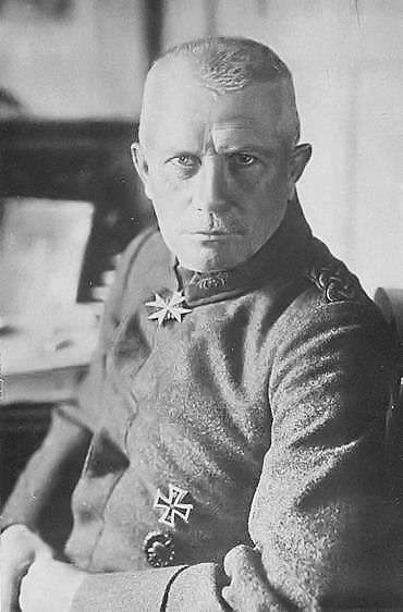 R. v. d. Goltz